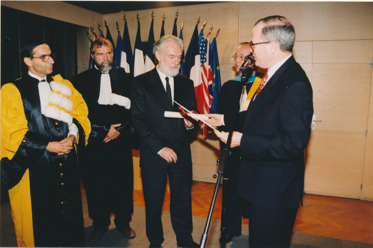 Saint-Dié-des-Vosges, Festival international de géographie (FIG), octobre 1995. Au centre, David Harvey, lauréat du prix Vautrin-Lud. Entouré de (de gauche à droite) : Rémy Knafou, Christian Leibundgut, de l'université de Fribourg-en-Brisgau, Antoine Bailly Christian Pierret, maire. Photo d'archive personnelle scannée